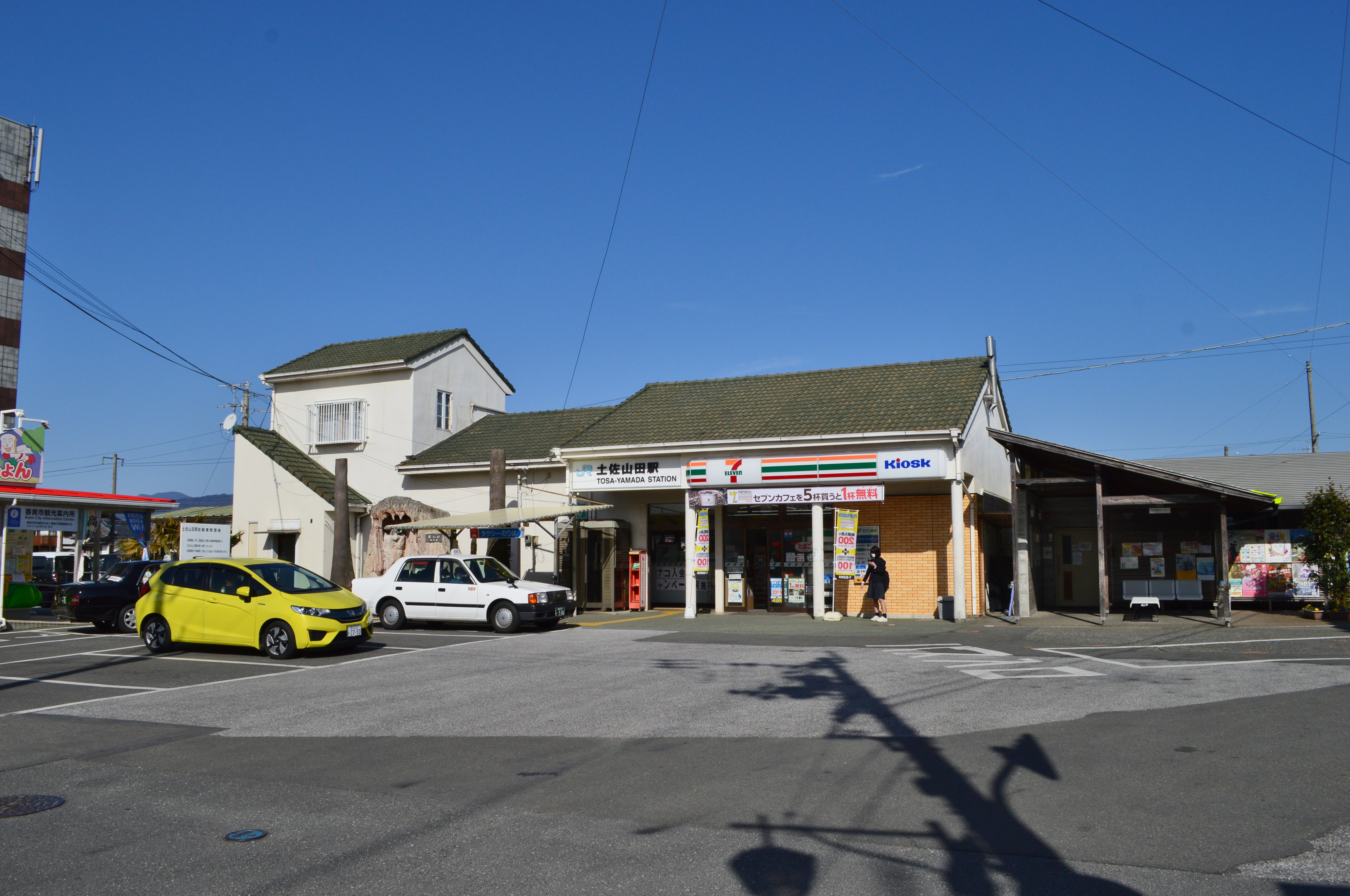 土佐山田駅 駅舎